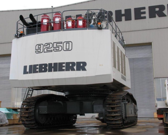 Pelleteuse Liebherr - Liebherr Raupenfahrzeug